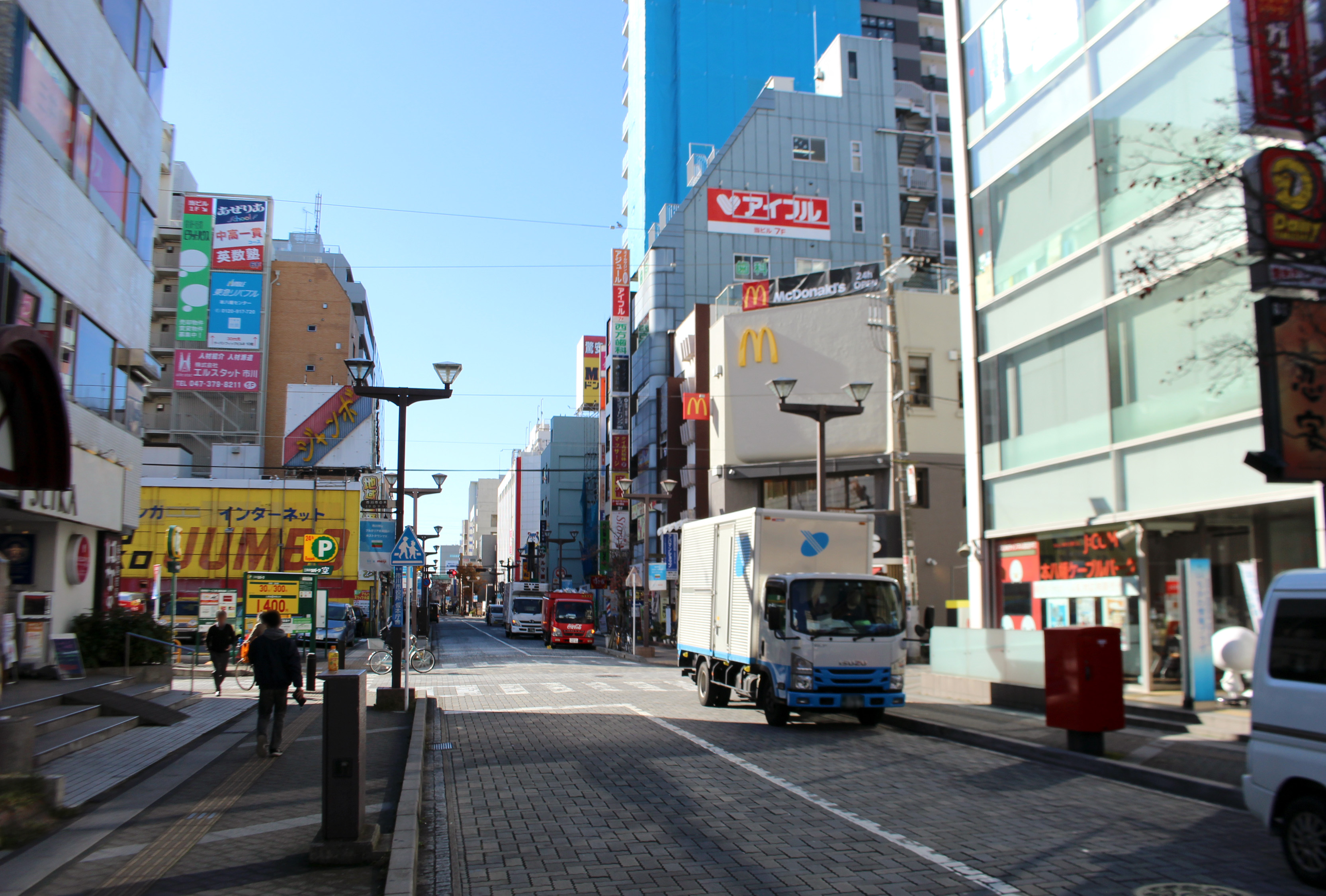 本八幡駅南口駅前の様子